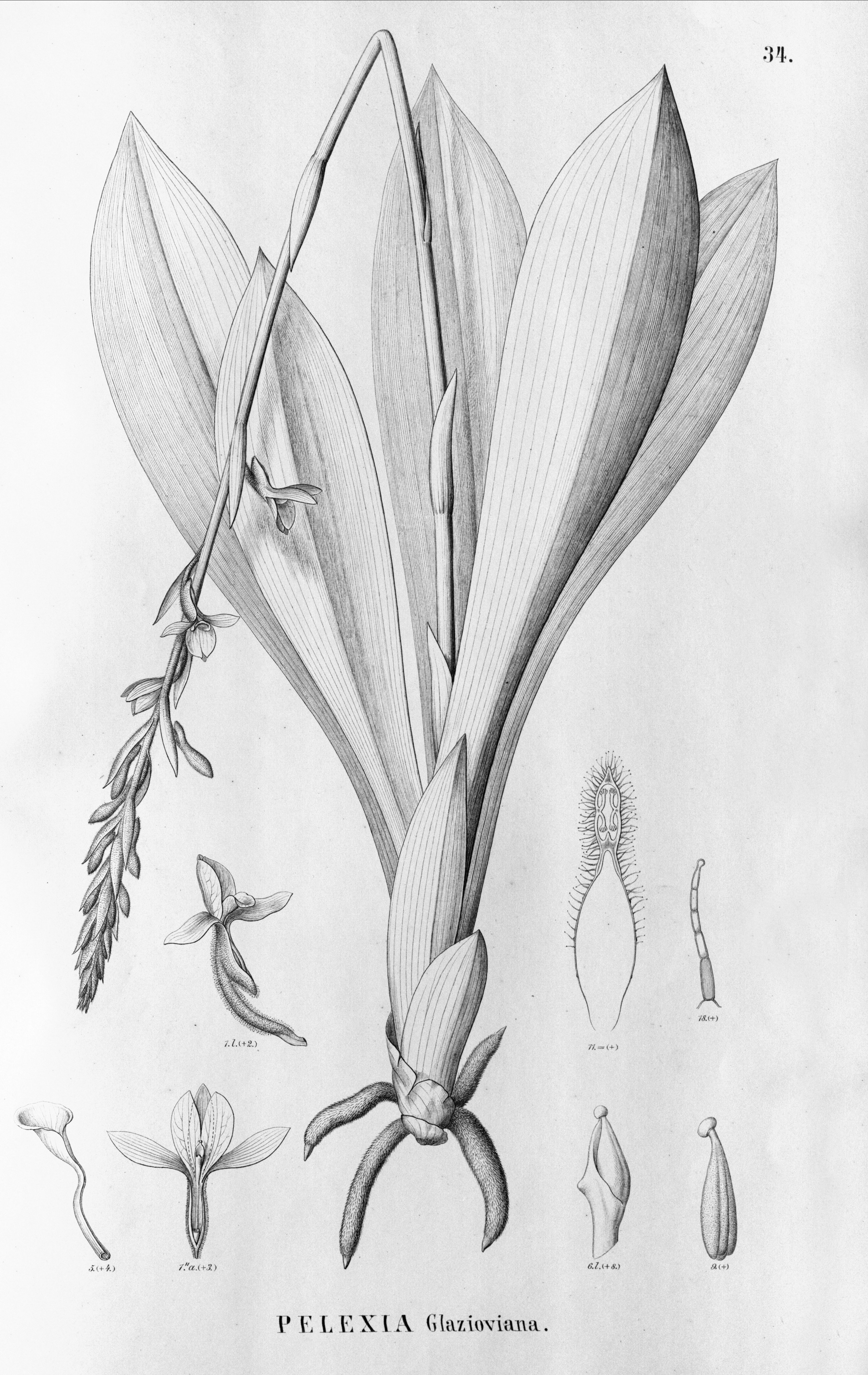 Illustration of Pteroglossa glazioviana (as syn. Pelexia glazioviana)